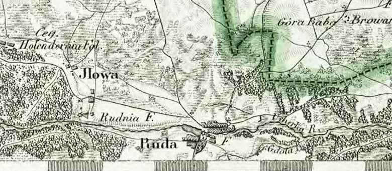 Ruda (powiat chełmski) na mapie topograficznej Królestwa Polskiego z 1839 roku